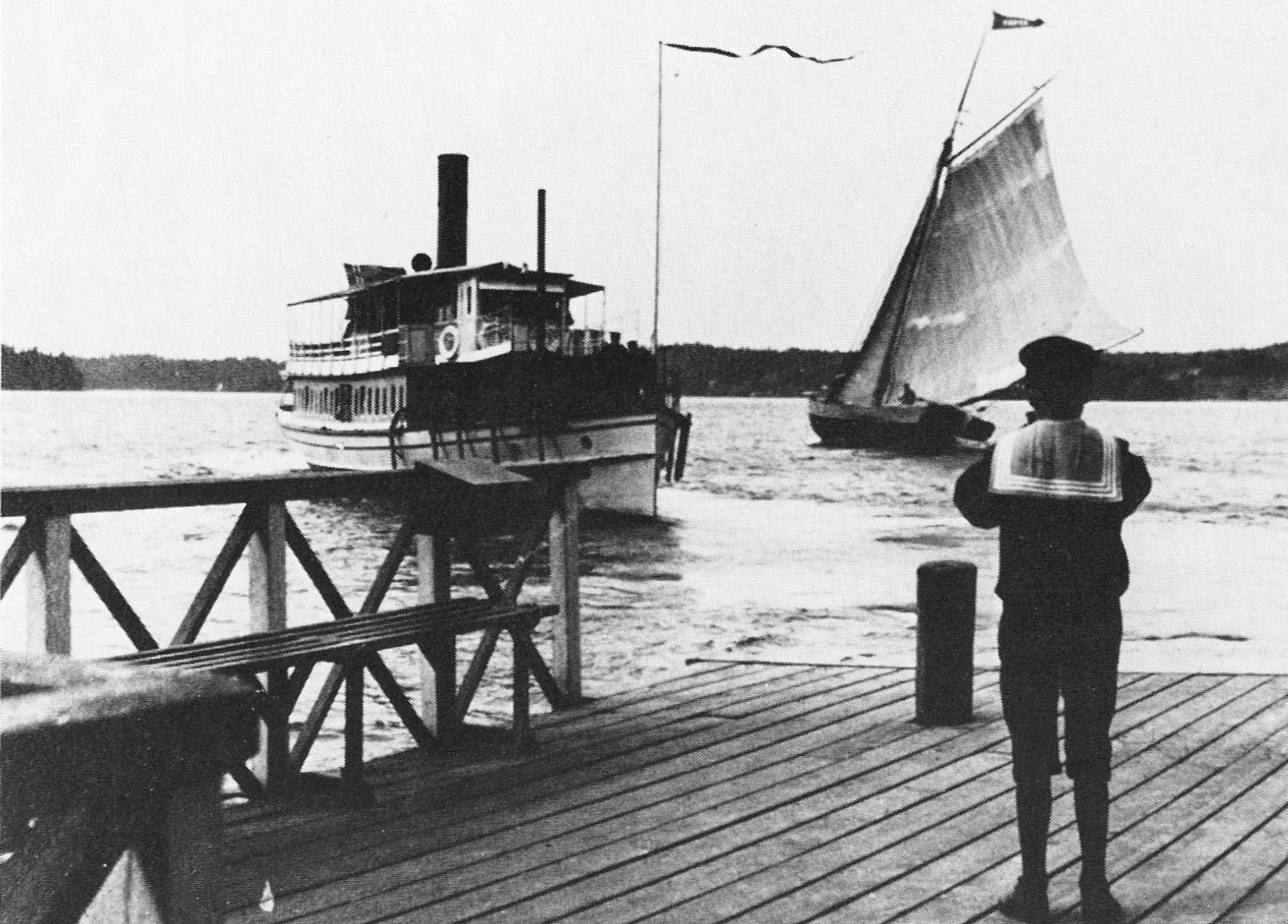 Sjöfröken vid Klubbensborgs brygga 1901